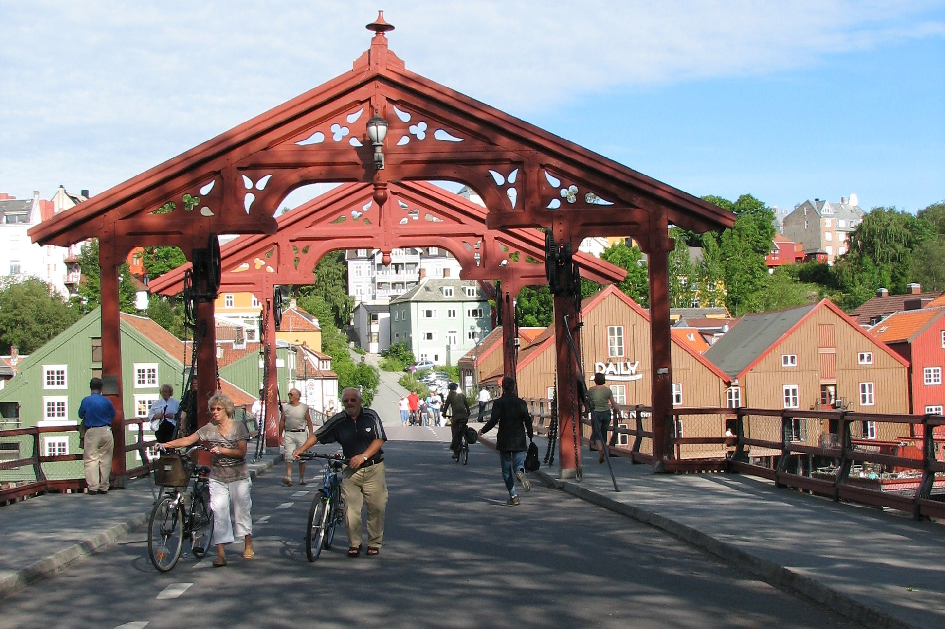 Pedestrian bridge, Trondheim